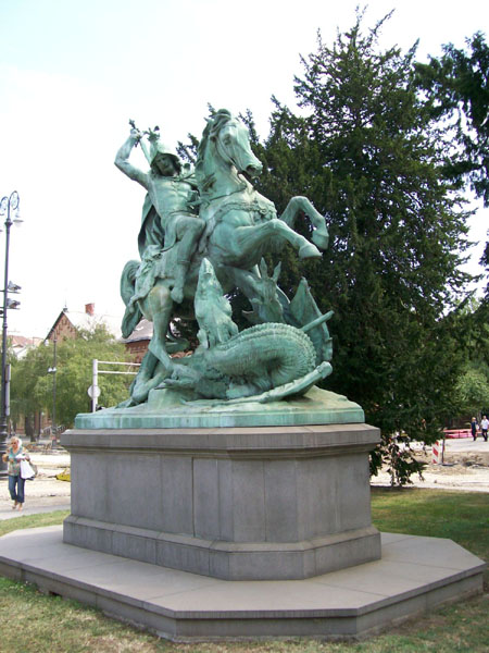 Sveti_Juraj_ubija_zmaja (Zagreb, pored HNK), djelo Antona Dominika Fernkorna iz 1853. godine.